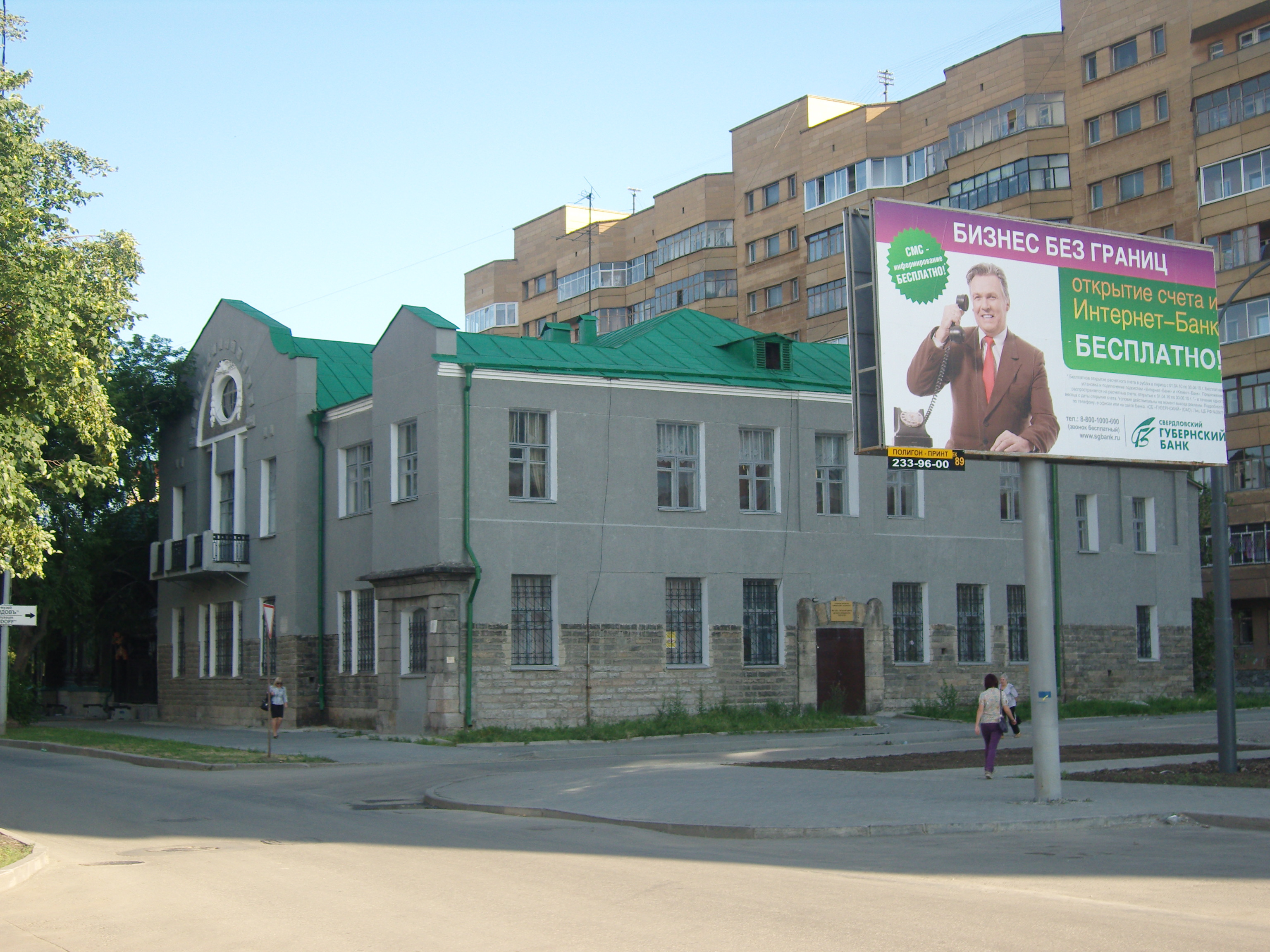 Дом Петровых.